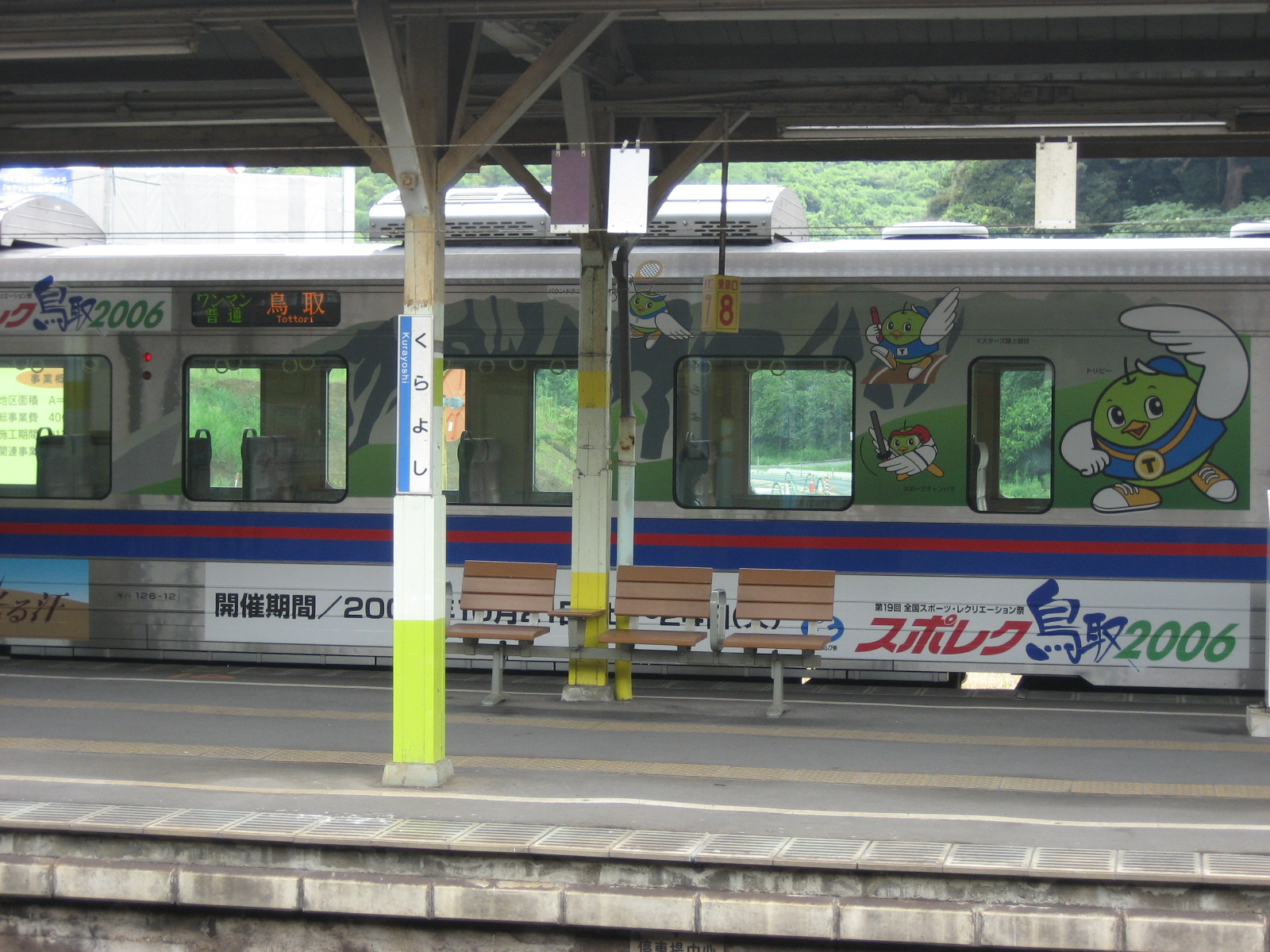 Series Kiha 126